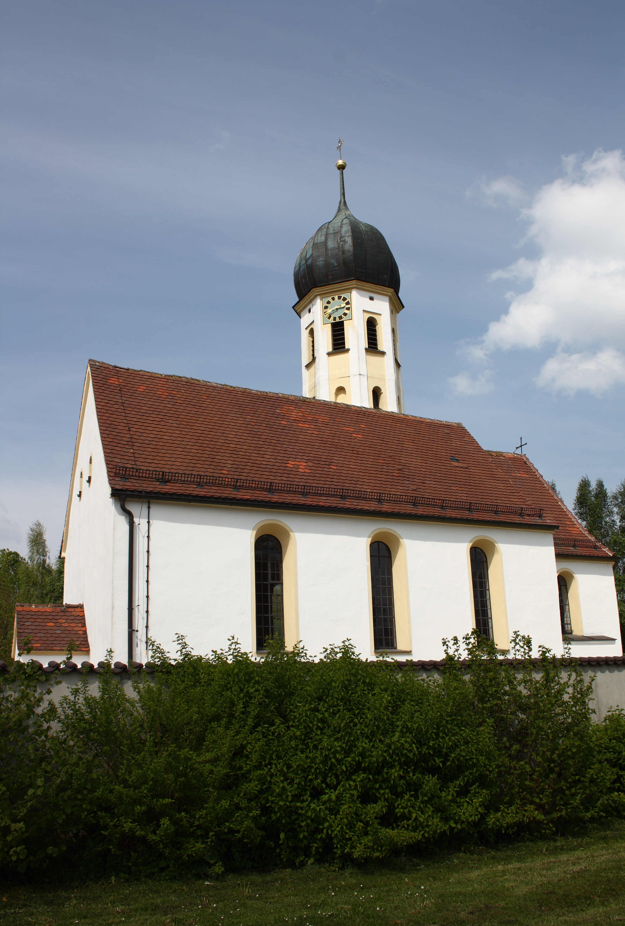 Katholische Filialkirche St. Veit in Veitriedhausen, einem Stadtteil von Lauingen im Landkreis Dillingen an der Donau (Bayern), heutiges Gebäude von 1728, Turm von 1701, Zwiebelhaube von 1786, Ansicht von Süden